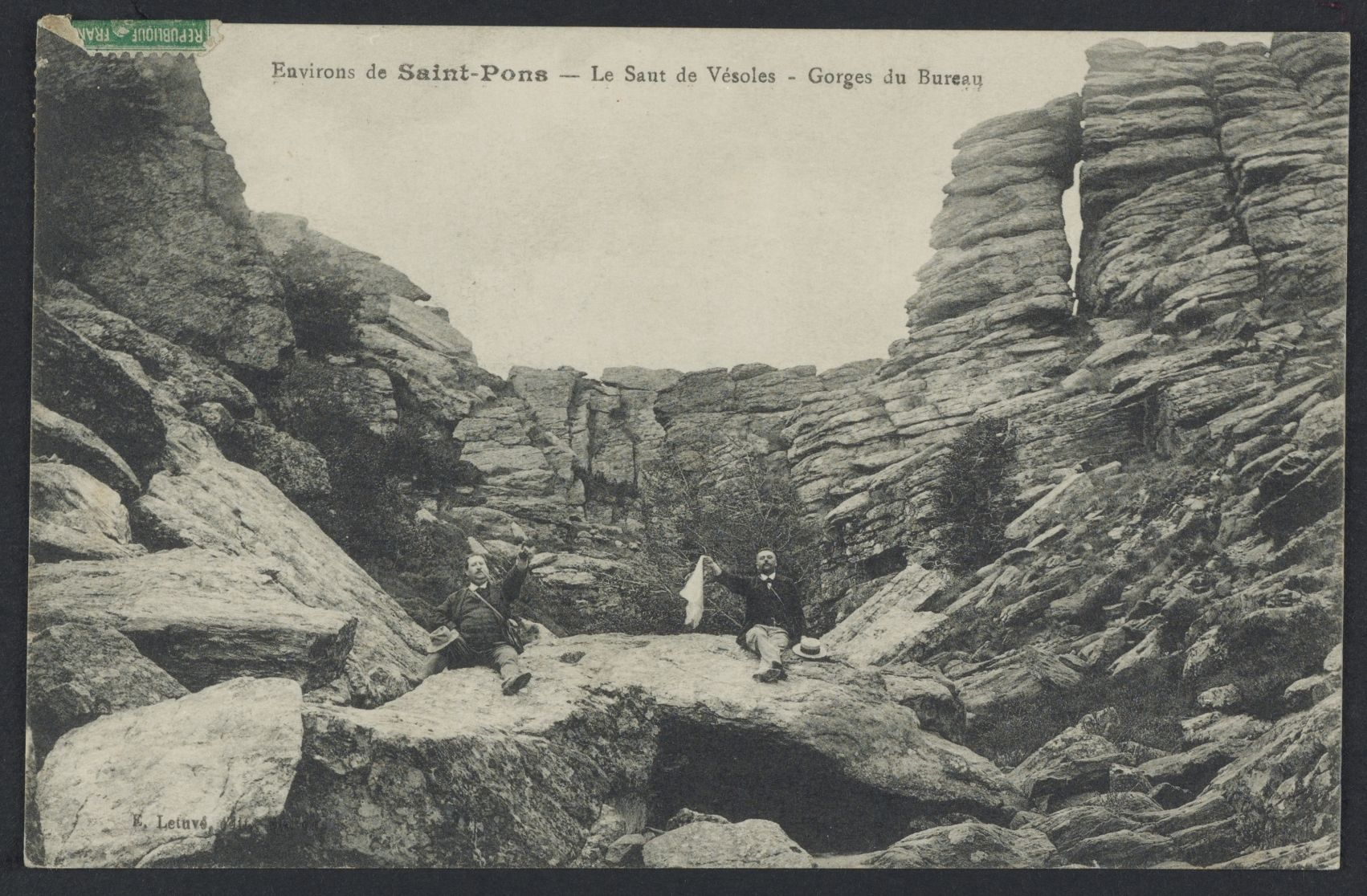 Prémian. - Le saut de Vesoles - Gorges du bureau : carte postale.